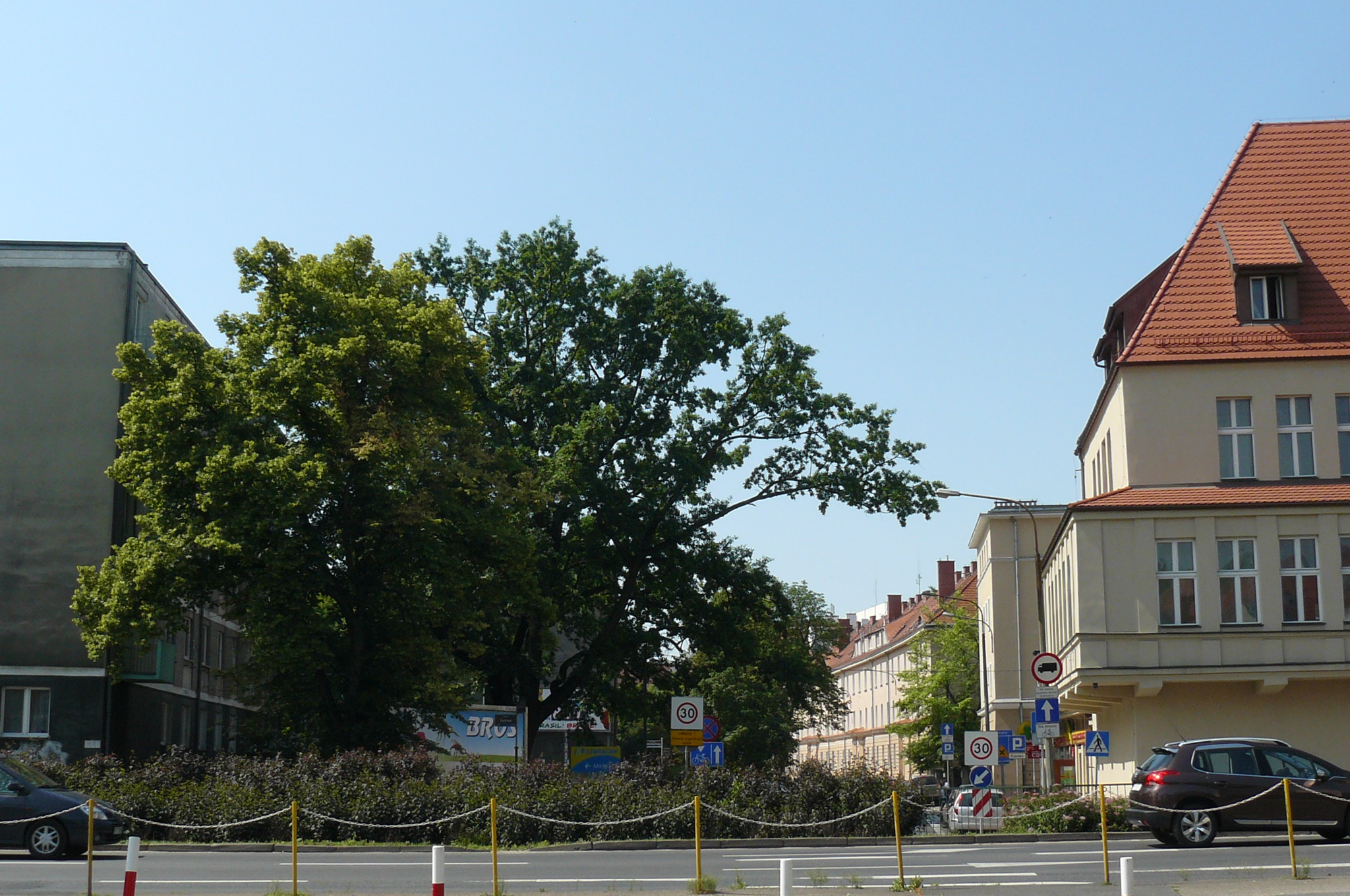 Pomnik przyr. Aleja kasztanowców w Poznaniu - ul. Kościuszki.